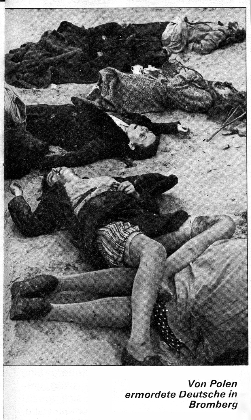 Бромберг.Жертвы погрома среди немецкого населения.